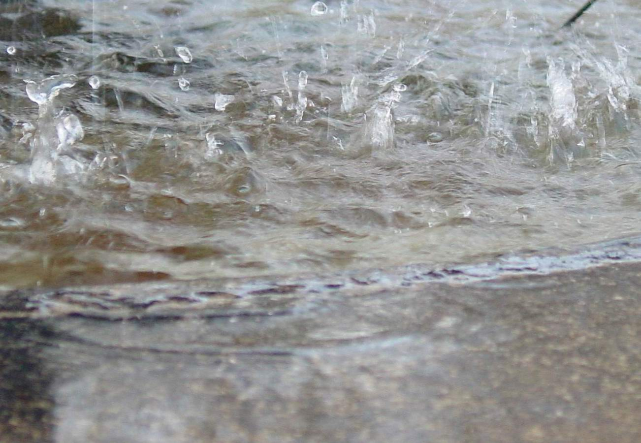 self made. Chuvia na rúa do Franco - Santiago de Compostela - Galica